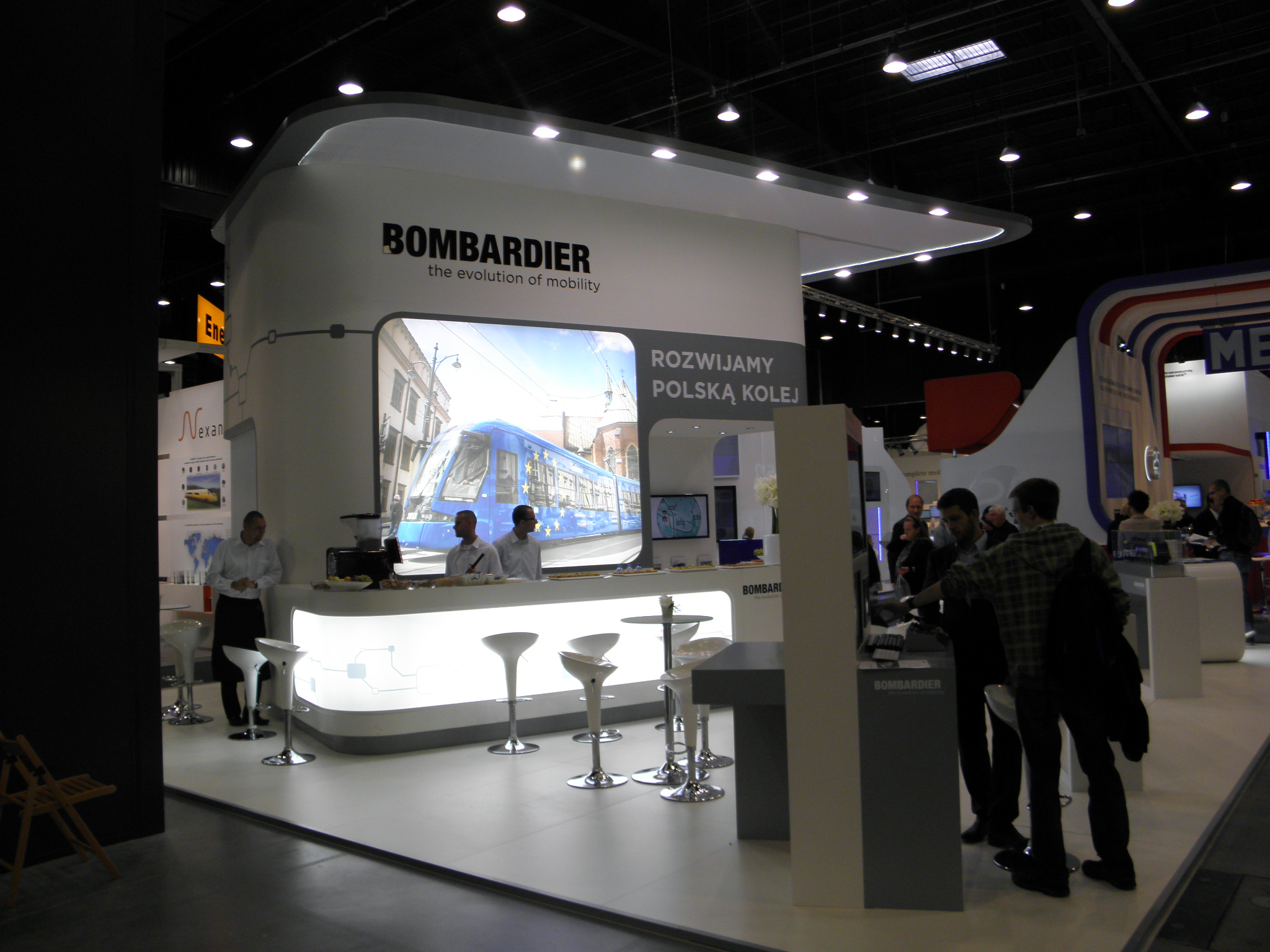 Photo from Trako 2013, Gdańsk/Danzig